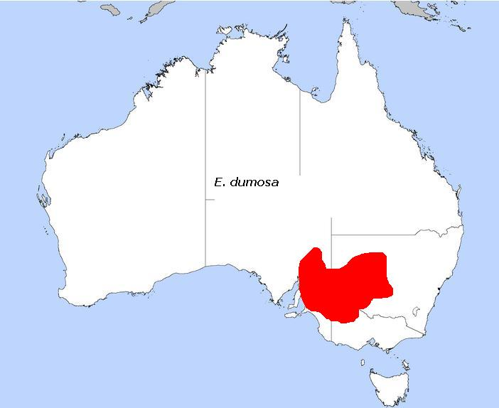 Carte de distribution eucalyptus dumosa